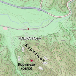 Topografska karta: Koritnjaka (brda i sela)